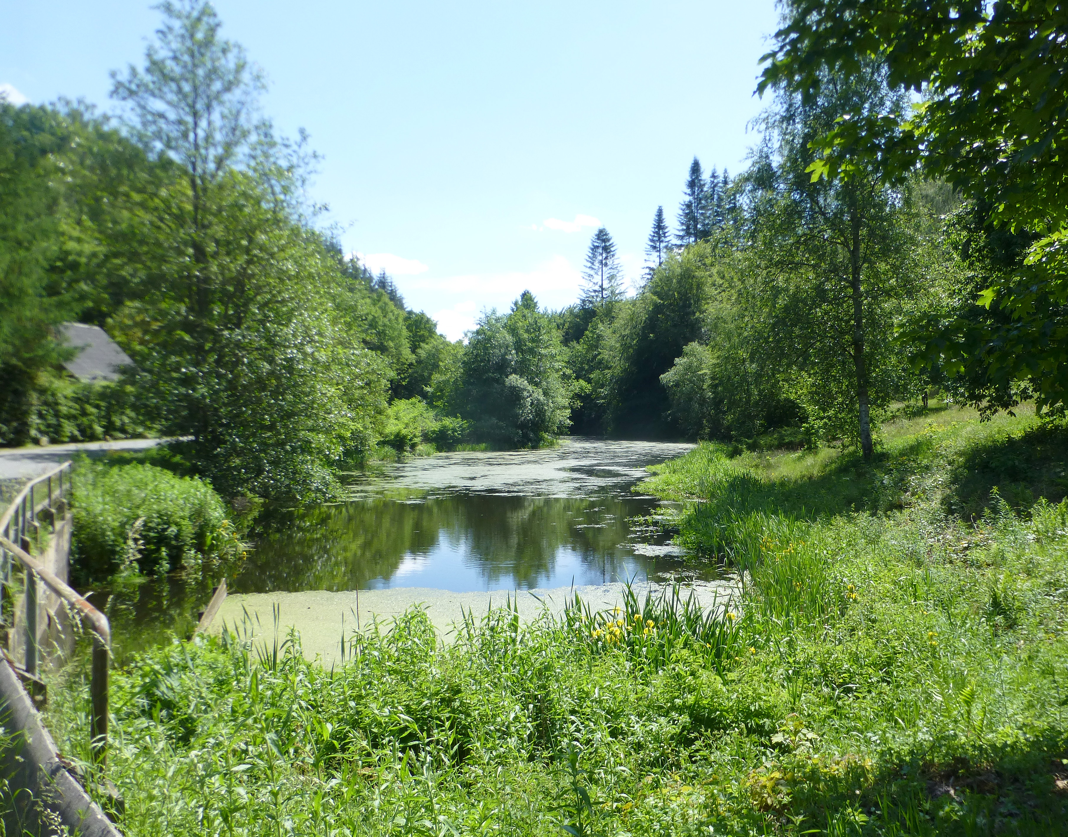 Mølledammen ved Lystrupminde, Lystup Å